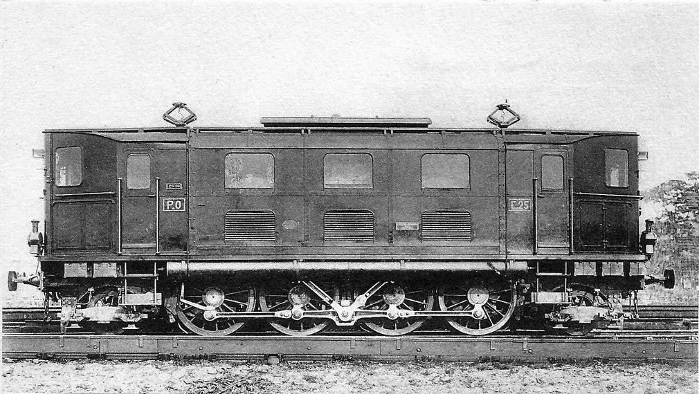 Locomotive PO 1D1 E 25, de la série E 21 à 25 pour trains de voyageurs et de marchandises, construite en 1920 par la S.L.M. Winterthur & Brown-Bovery.